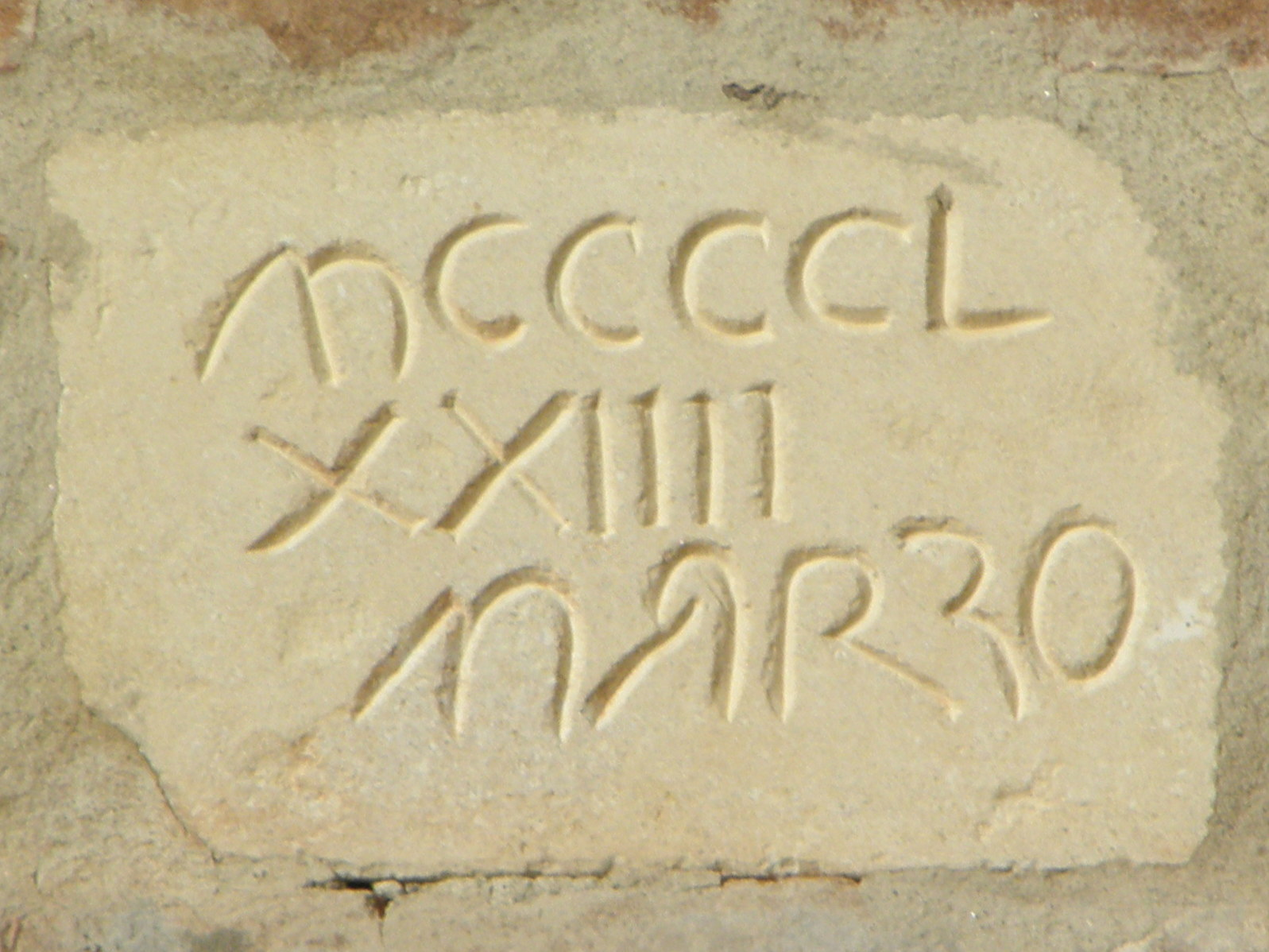 Bagnoletto, località di Bagnoli di Sopra: l'oratorio di San Daniele, già parrocchiale, risalente al XIII secolo.